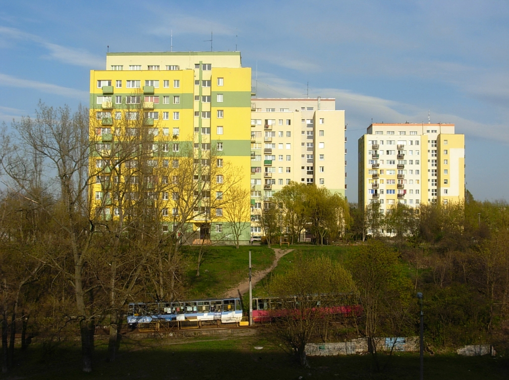 Fragment osiedle Kapuściska w Bydgoszczy